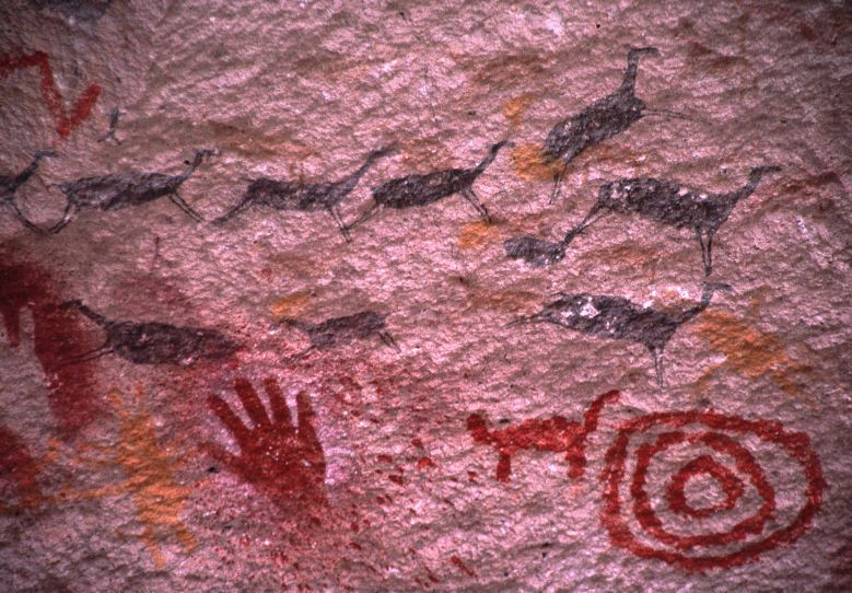 Handabdrücke, Cueva de las Manos